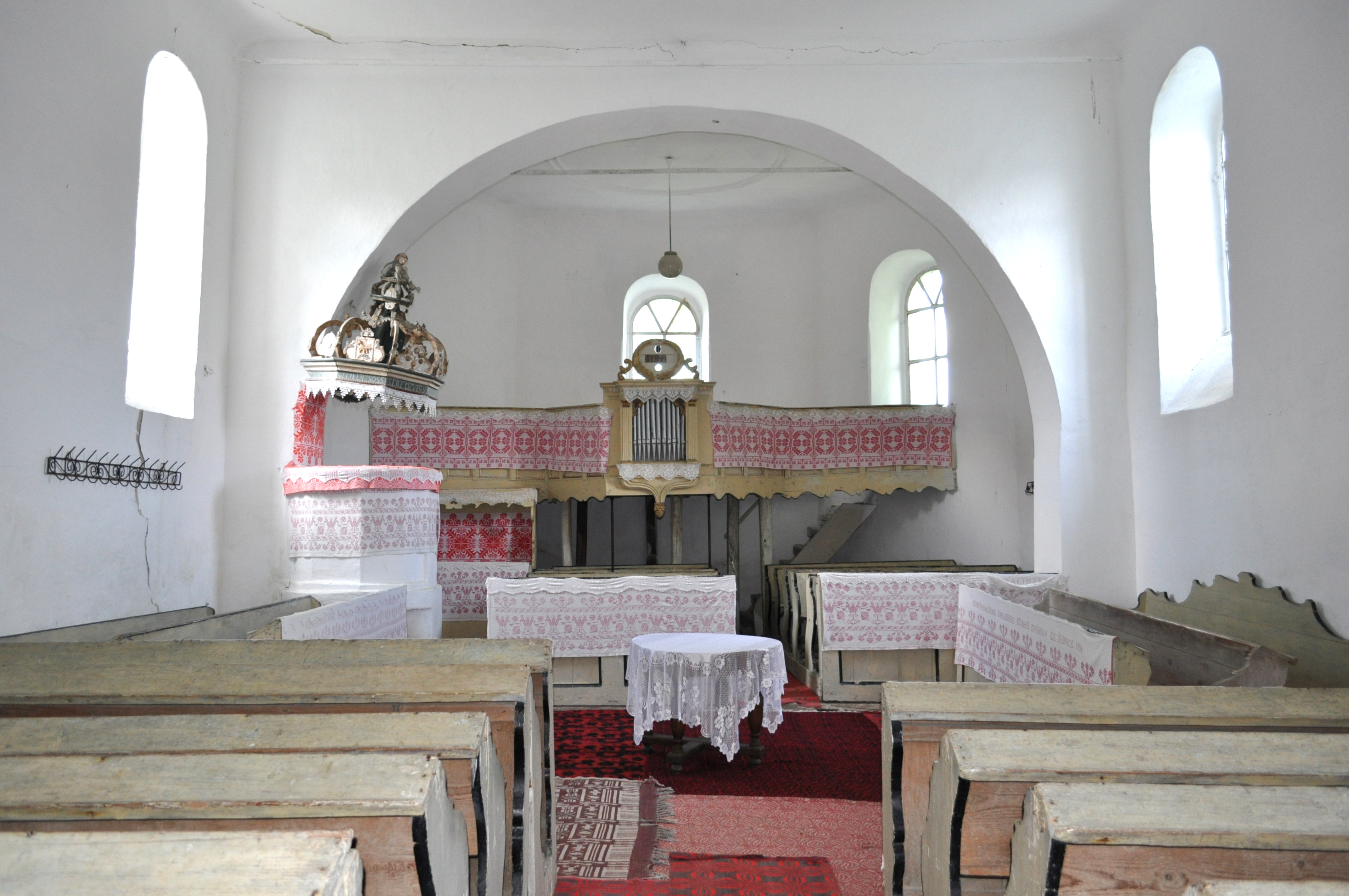 Biserica reformată din satul Fântânița; comuna Miceștii de Câmpie, județul Bistrița-Năsăud 01